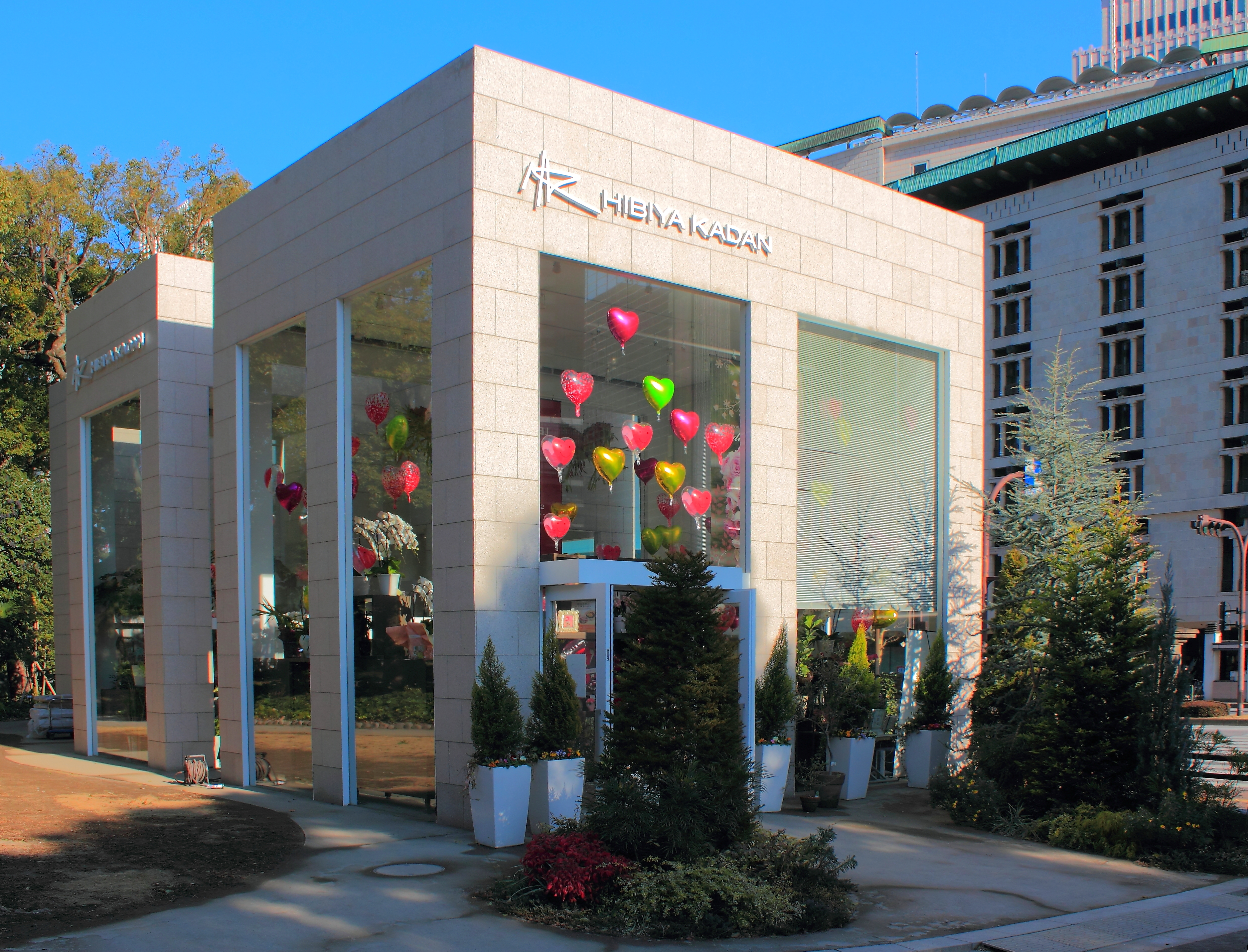 日比谷花壇店舗（日比谷公園内）